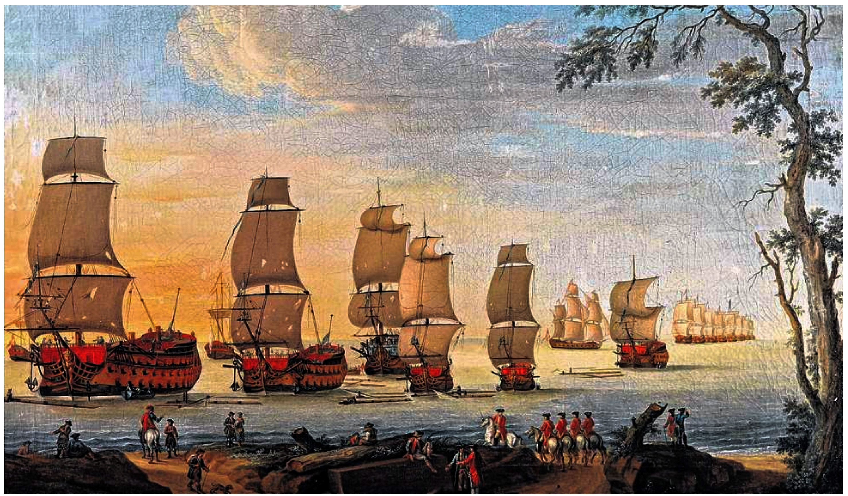 Die gestrandete schwedische Flotte bei der Schlacht auf der Kolberger Heide (Seeschlacht bei Fehmarn, 1715)